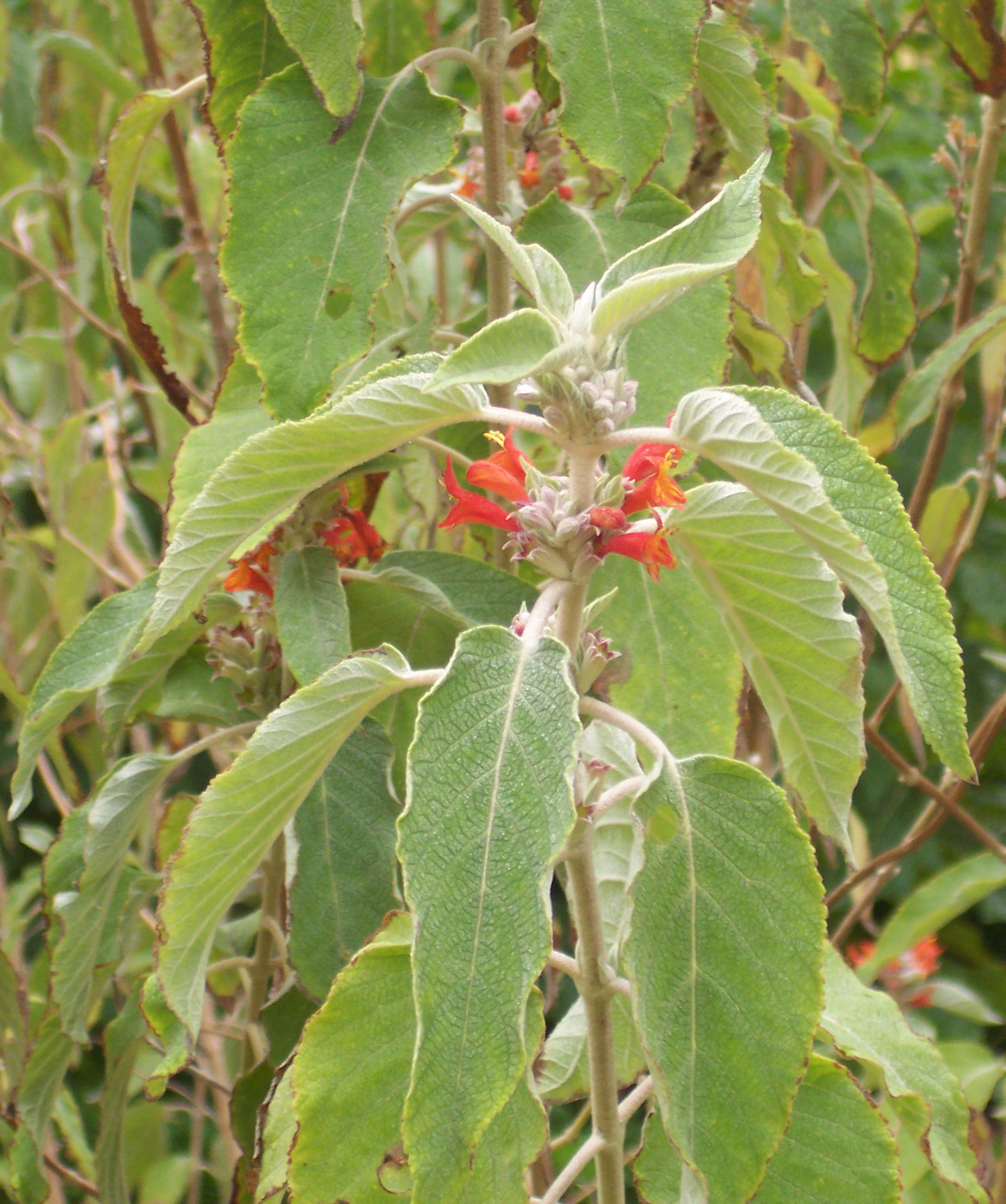 Colquhounia coccinea. Real Jardín Botánico de Madrid.